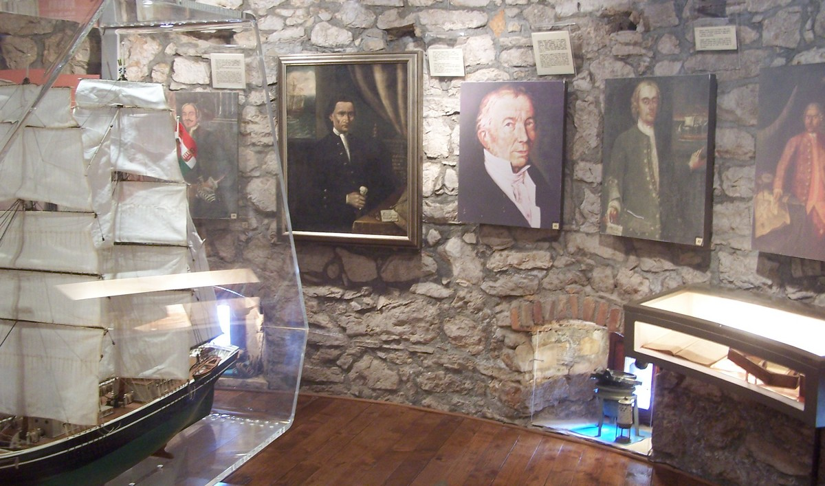 Veli Losinj Museum Kula Seefahrtgeschichte